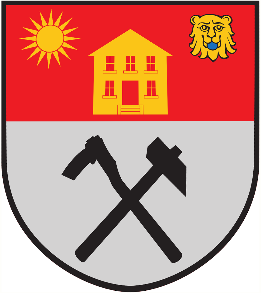 Die strahlende Sonne und das zweigeschossige Haus weisen auf das Iserter Schulhaus hin, das als „Haus der Sonne“ eine historische Bedeutung für die Schulreformen im Westerwald gehabt habe. Der Leopardenkopf steht für die territoriale Zugehörigkeit der Ortsgemeinde Isert zur Grafschaft Sayn und später zur Grafschaft Sayn-Altenkirchen. Durch Berghammer und Rodungshacke werde der Abbau des Eisens, aber auch die Anlegung der Siedlung durch Rodung symbolisiert.